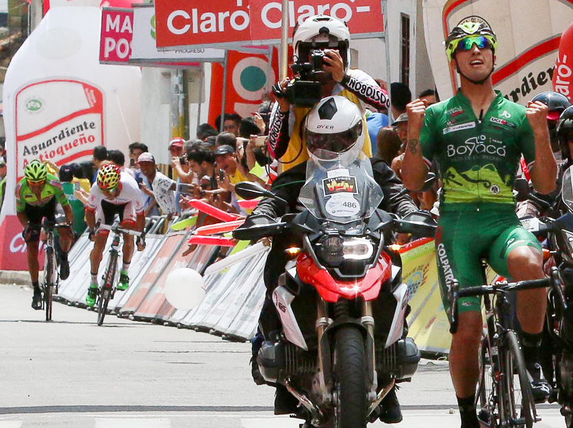 Et.5 Clásico RCN 2016. Yeison Chaparro en Bucaramanga.